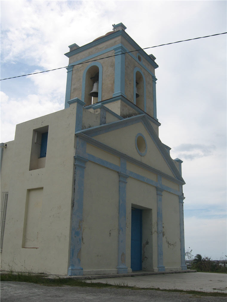 Fotografia actual de la Iglesia de Cabañas